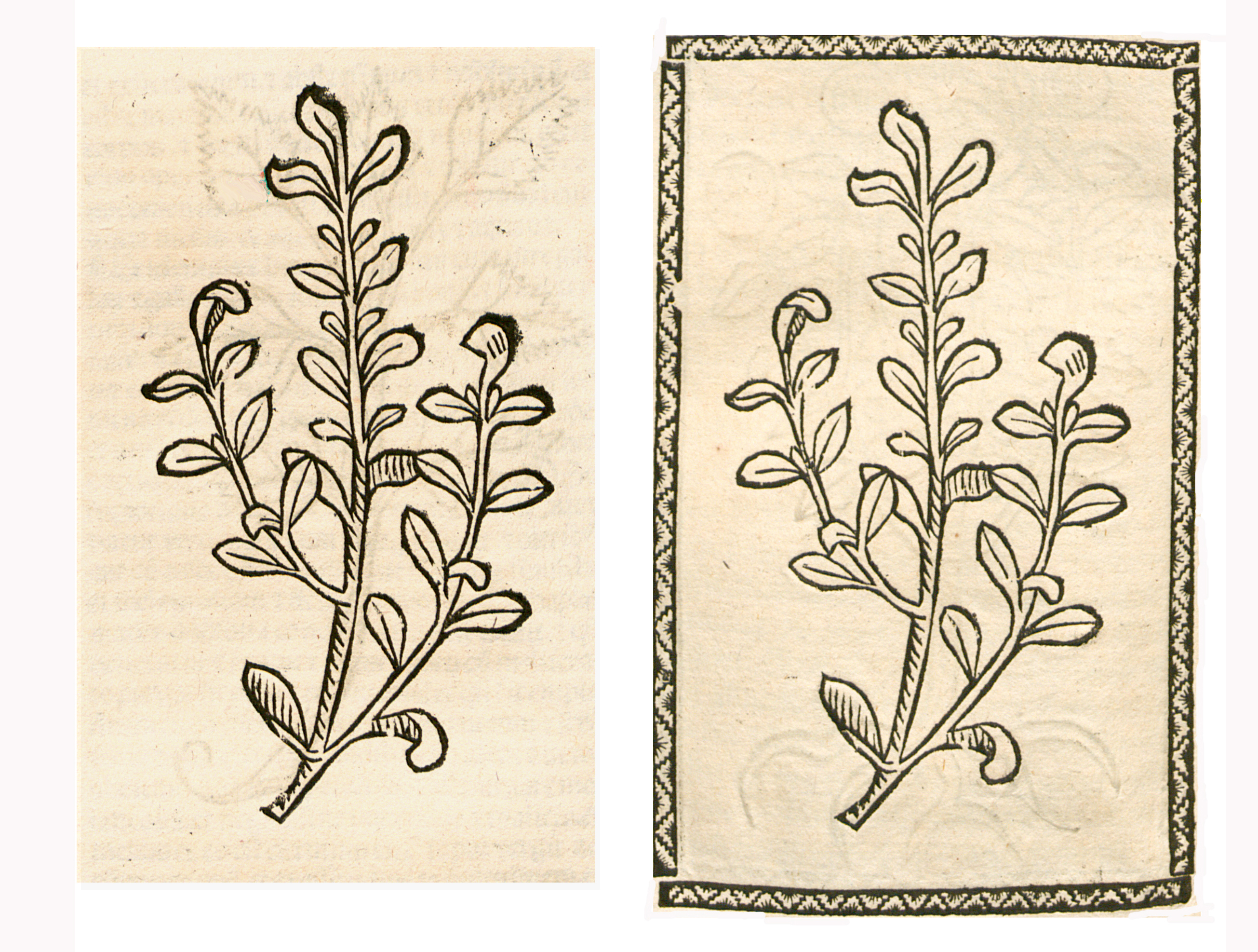 Abbildung von: Polei